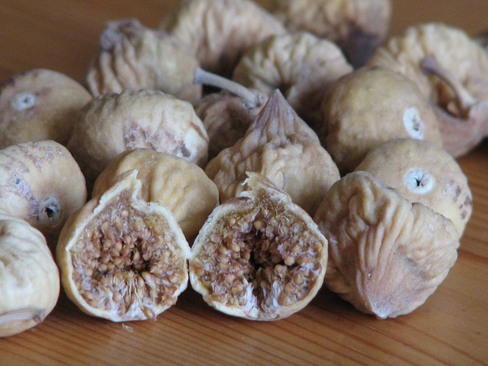 Getrocknete Maulbeerfeigen (Ficus sycomorus), Durchmesser ca. 2cm. Im Vordergrund ein aufgeschnittenes Exemplar.